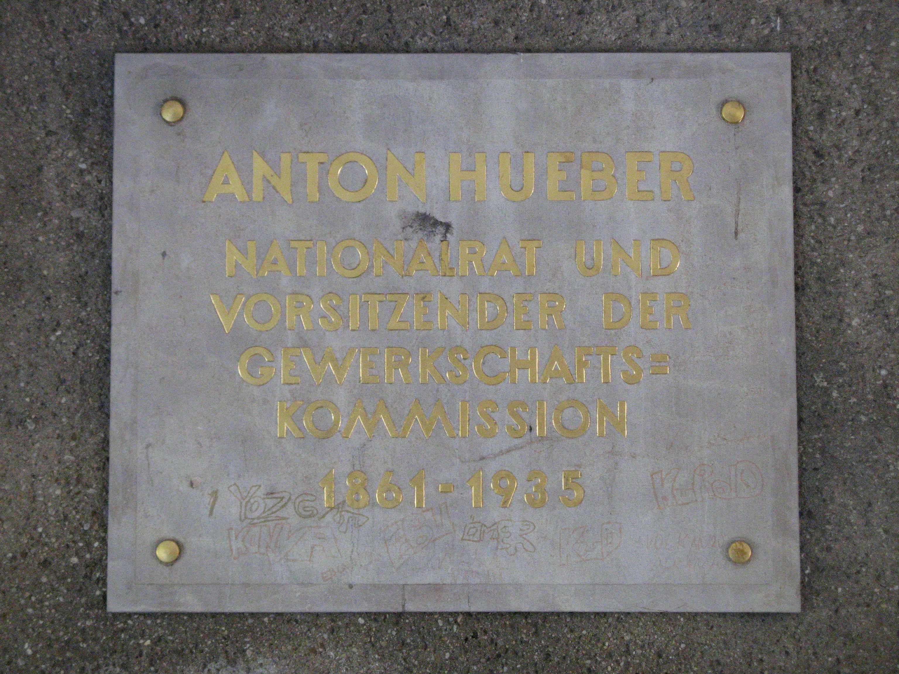 Gedenktafel für Anton Hueber, Hueber-Hof, Quellenstraße 24B, Wien-Favoriten